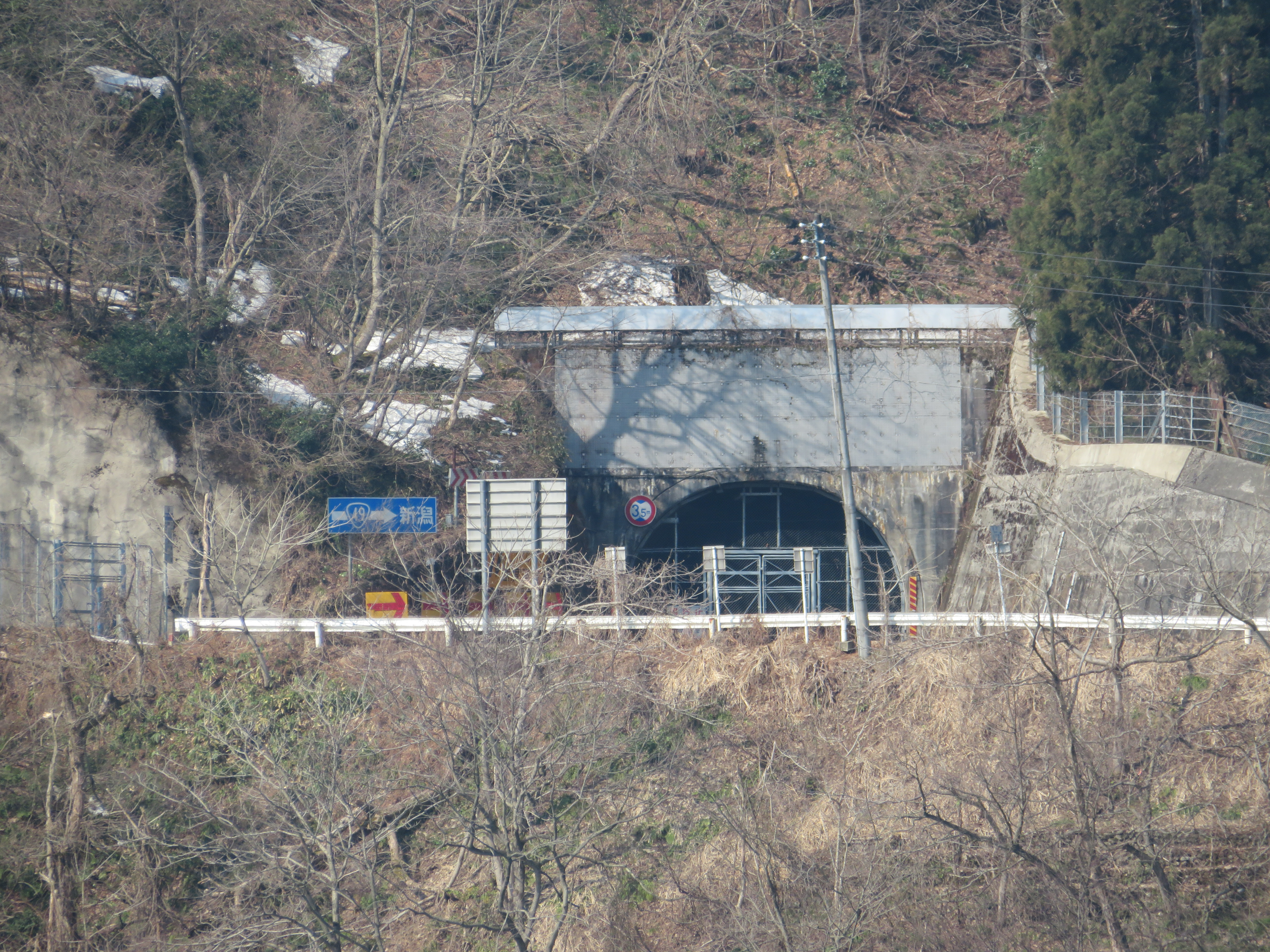 国道49号線揚川隧道（西会津方面側坑口を小花地大橋付近から撮影）